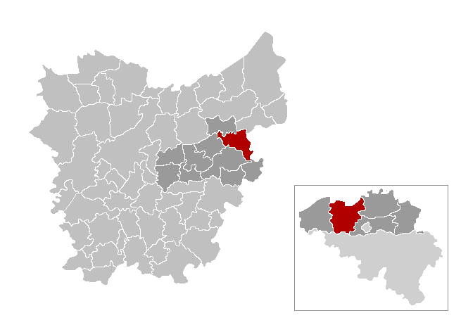 Gemeentekaart, eigen werk Categorie:Kaart met locatie Belgische gemeente